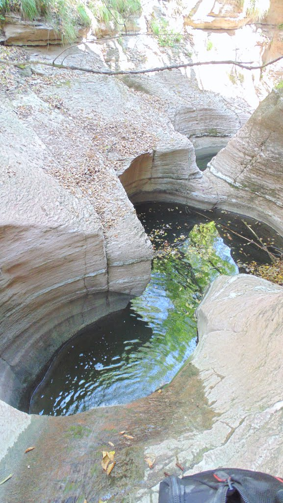 In questo torrente si può ammirare come l'acqua ha scavato la roccia nel corso dei secoli